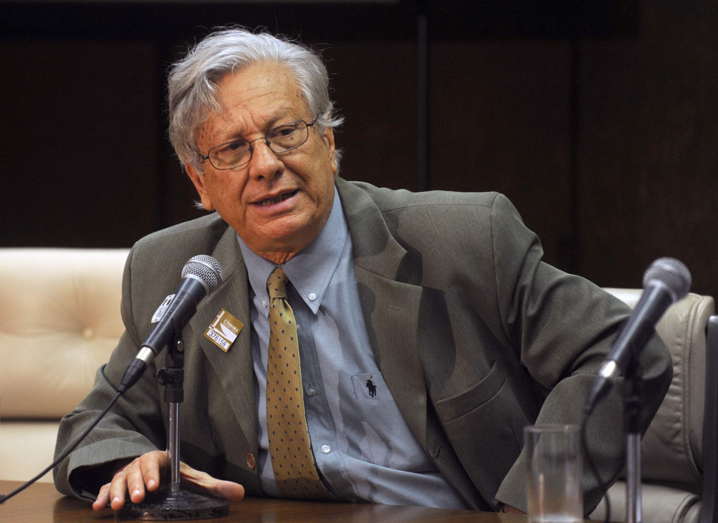 Brasília - O professor da URFJ Luiz Pinguelli Rosa participa de seminário sobre a camada pré-sal, promovido pelo PSB na Câmara dos Deputados Foto: Antonio Cruz/ABr